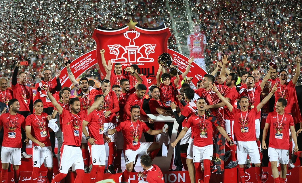 جشن قهرمانی پرسپولیس در لیگ هفدهم